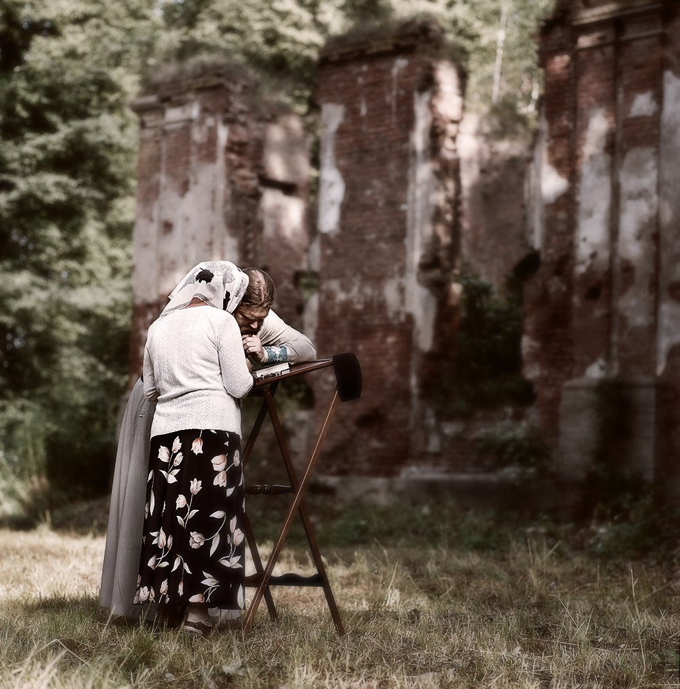 Стена Церкви Тихвинской иконы Божией Матери (Путилово)